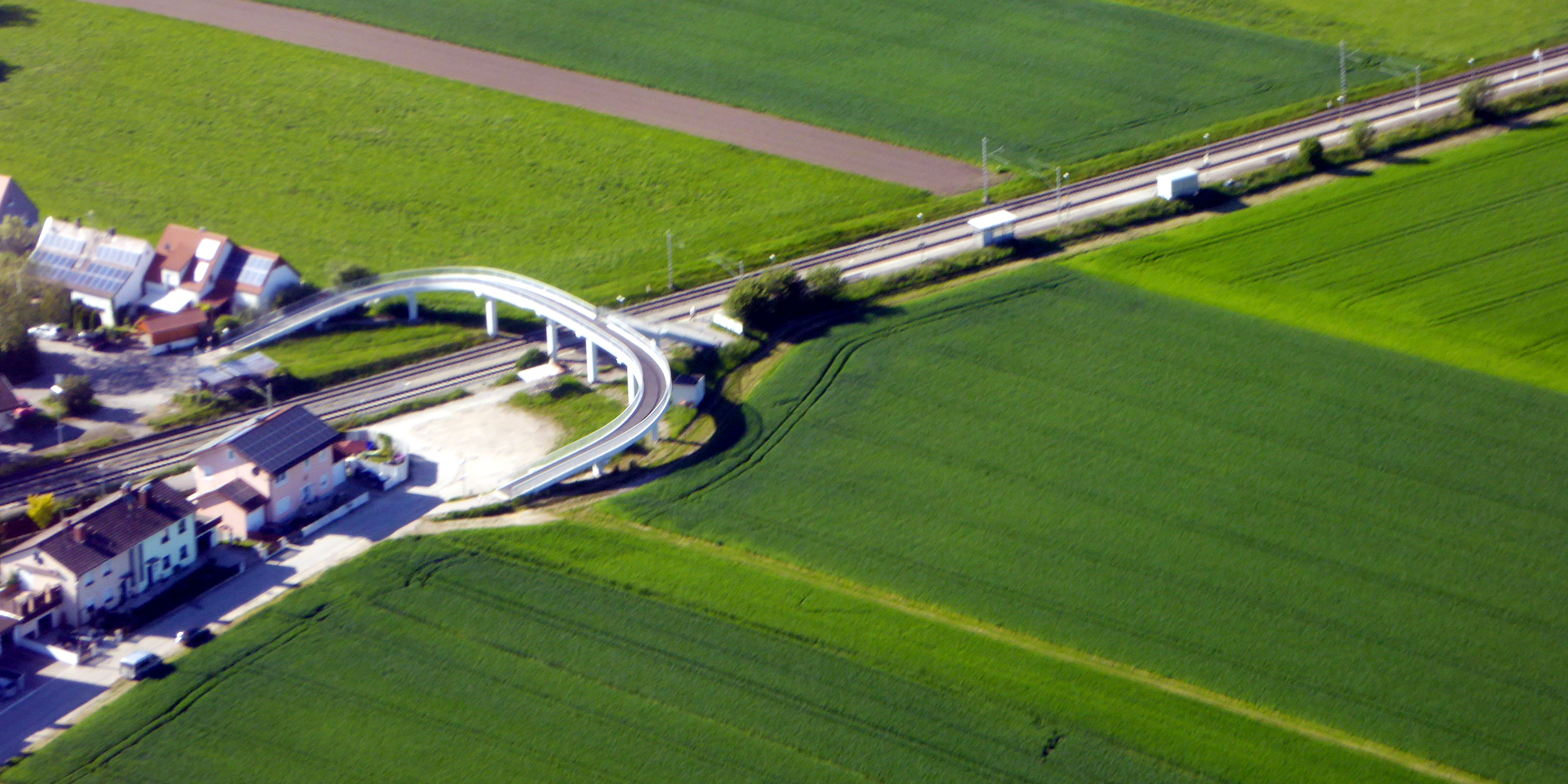 S-Bahnhof Pulling in der Gemeinde Freising, von Süden gesehen.